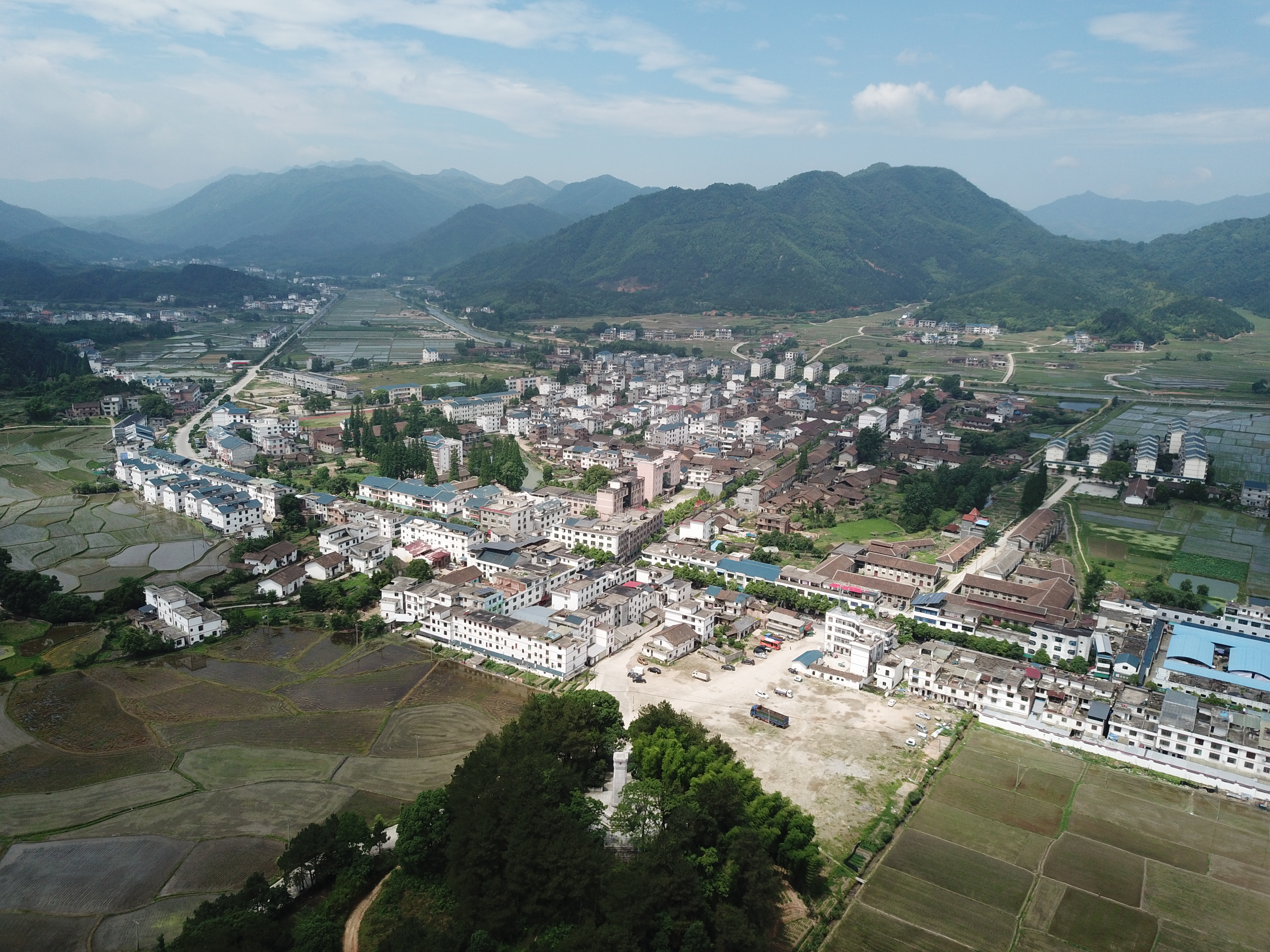 东固